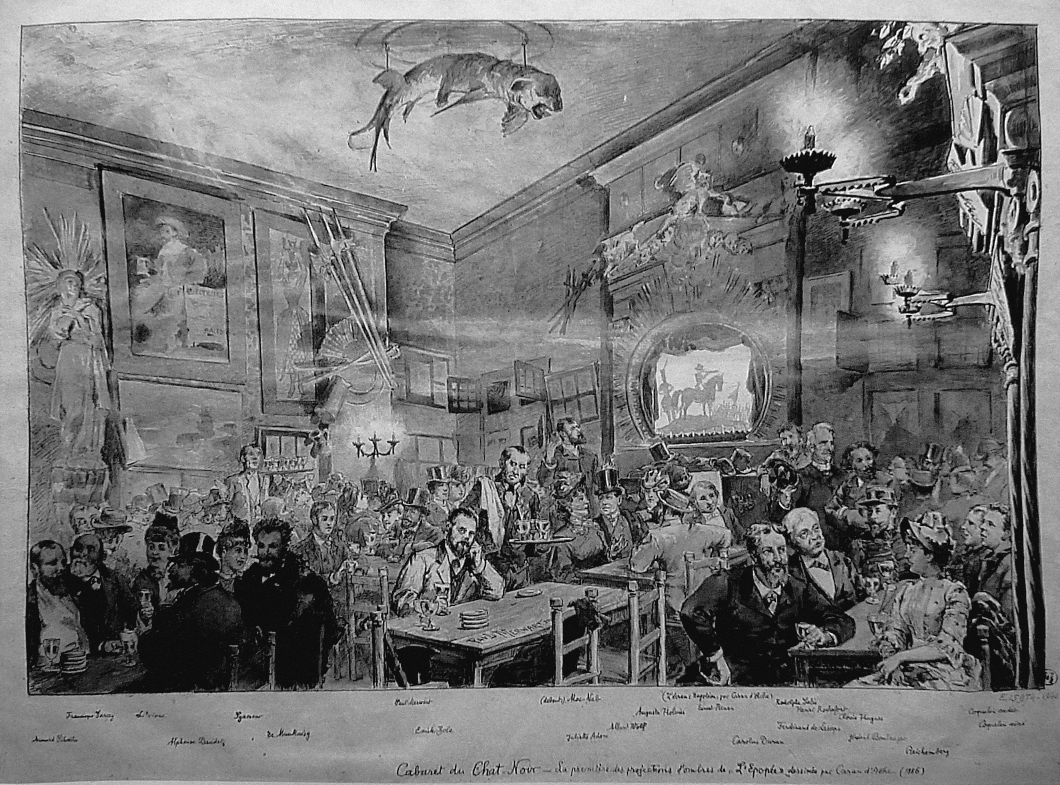 Gravure de Paul Merwart Projection au cabaret du Chat Noir Première de la projection L'épopée par Caran d'Ache en présence de nombreuses personnalités (voir annotations). Musée Carnavalet (Paris).